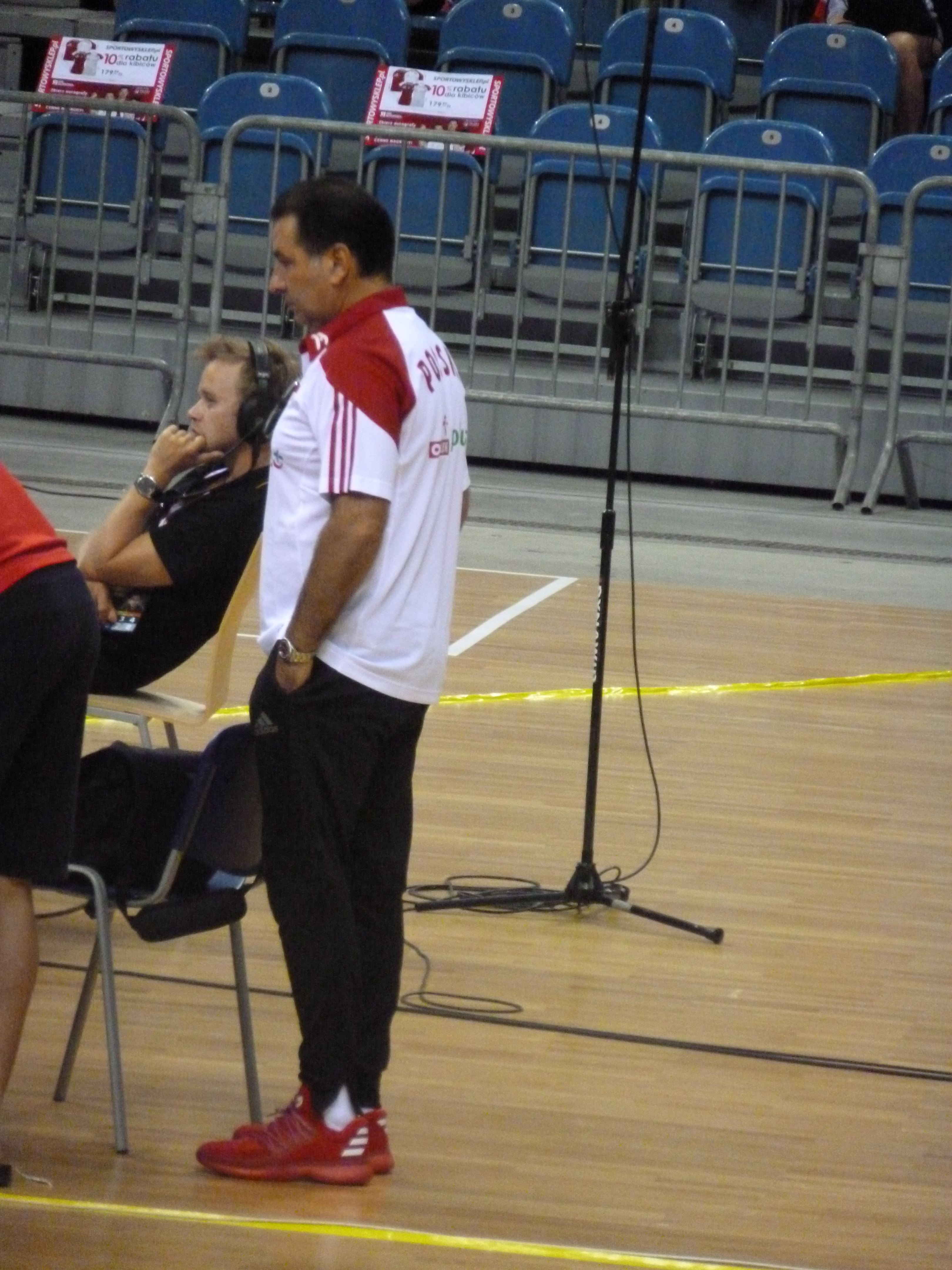 Zdjęcie zrobione podczas Memoriału Huberta Jerzego Wagnera 2017